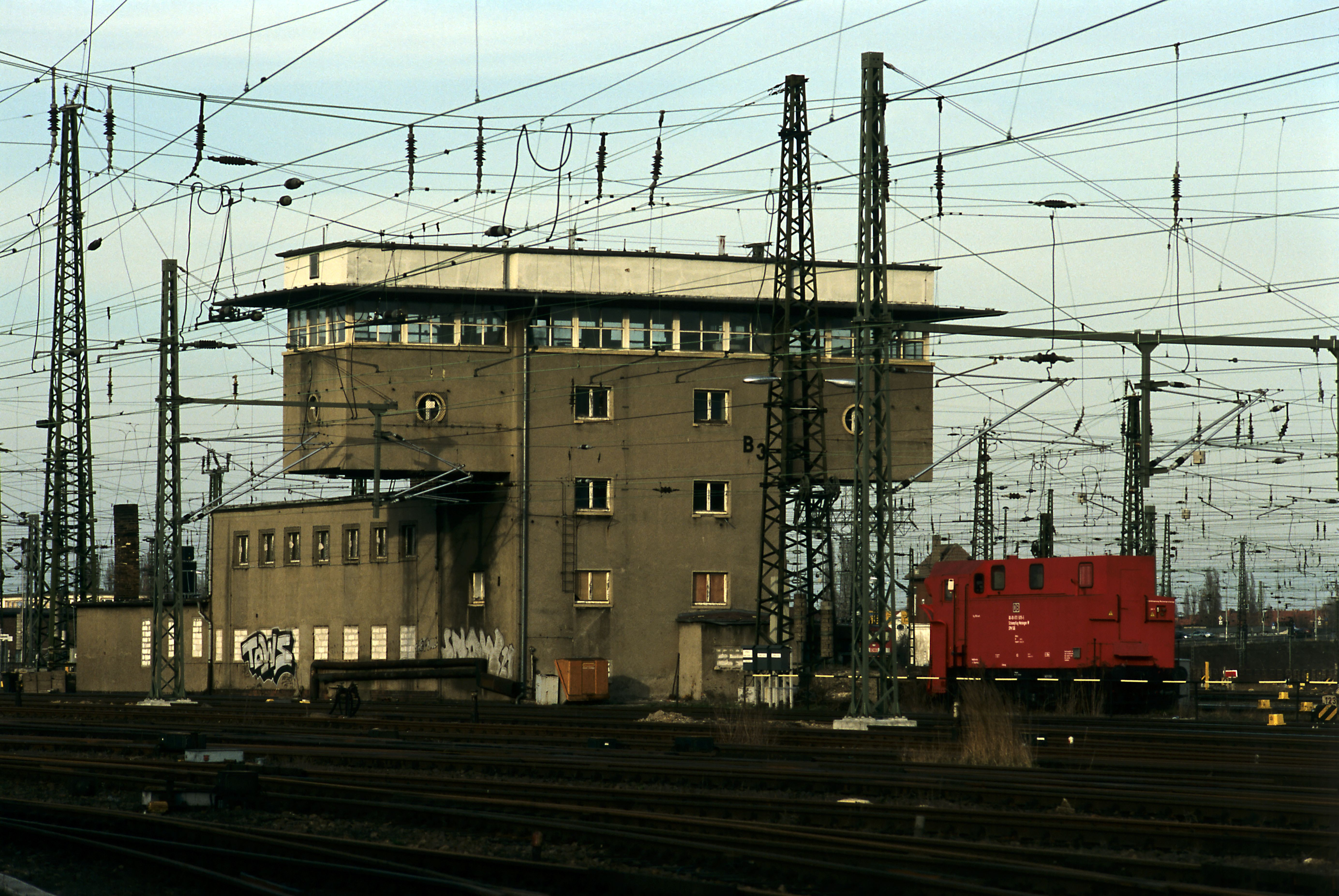 Am Tag der Außerbetriebnahme der Hallengleise 4 und 5. Das 1940 gebaute Stellwerk war ein elektromechanisches Vierreihenhebelwerk und ist zum Aufnahmezeitpunkt schon drei Jahre außer Betrieb. Die Höhe der Anbauten über zwei Etagen liegt an der Bauart der Zwei- und Vierreihenhebelwerke, bei denen die Kontakteinrichtungen und die zu den Hebeln gehörenden Magnete unter dem Boden des Bedienraumes angeordnet sind. Rechts daneben ein Schneepflug Bauart Meiningen. Im Frühjahr 2007 wurde das Gebäude abgebrochen.